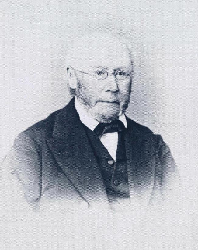 Senaattori Otto af Schultén (1798–1884).